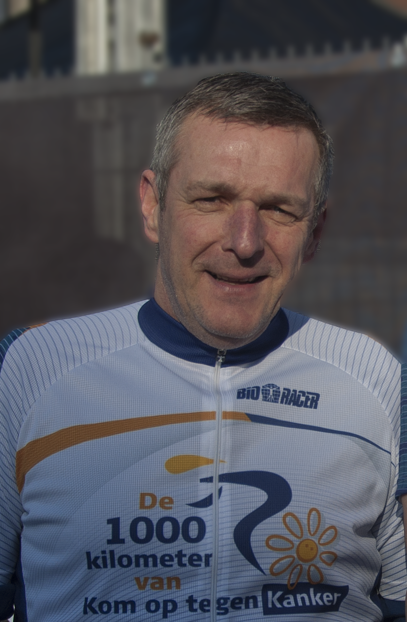 Leo Van Der Elst terwijl hij "Kom op tegen kanker" promoot bij de start van de Omloop Het Nieuwsblad 2012